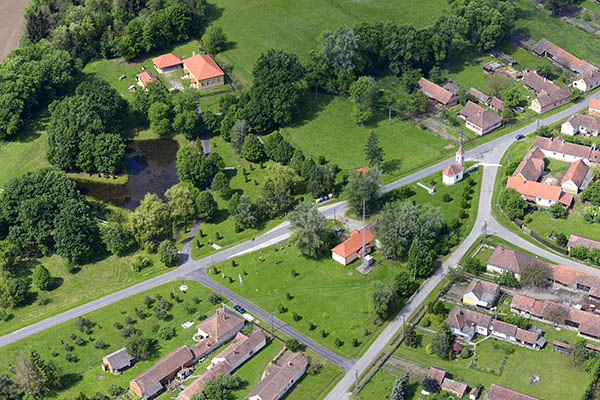 Zalaszombatfa északnyugati irányban fotózva a Petőfi Sándor utca felől. A távolabbi, szélesebb úttestű utca a Kossuth Lajos út.